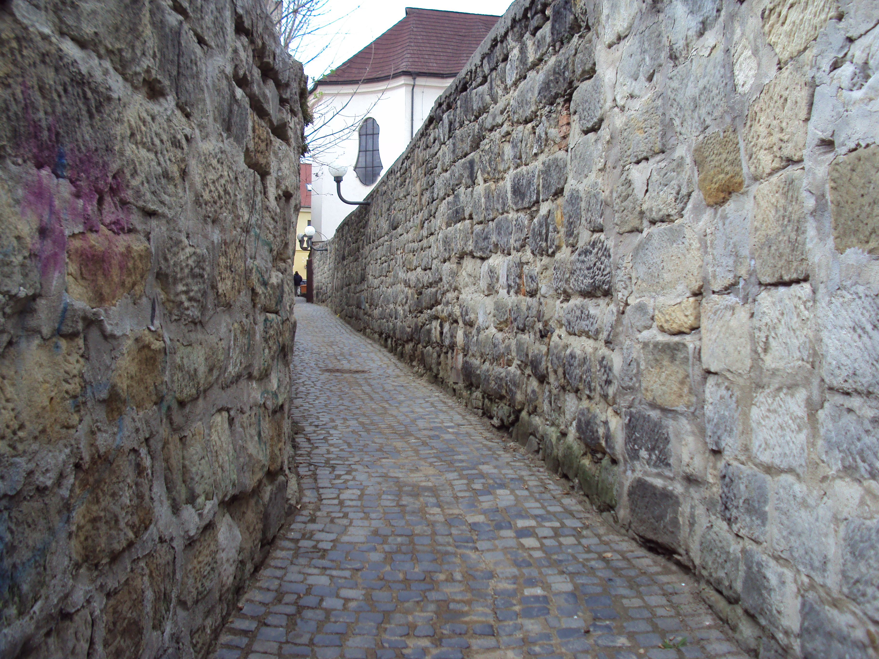 Cesta podél hradeb kláštera a muzea